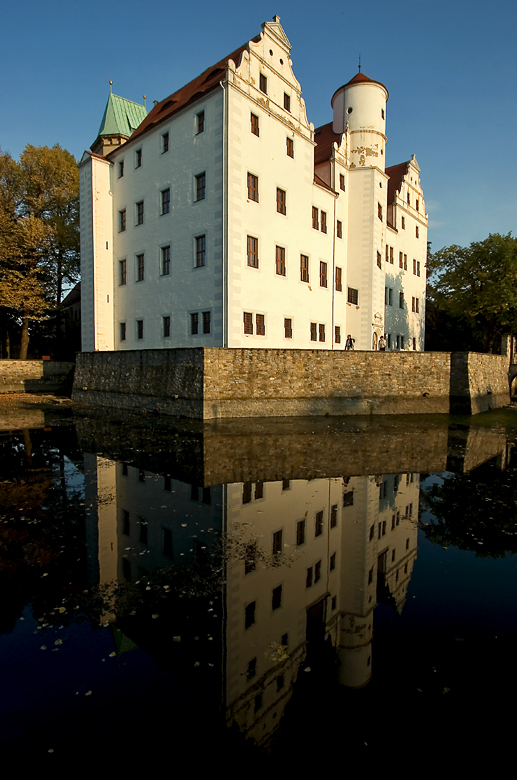 Schloss Schönfeld in Sachsen, östlich von Dresden